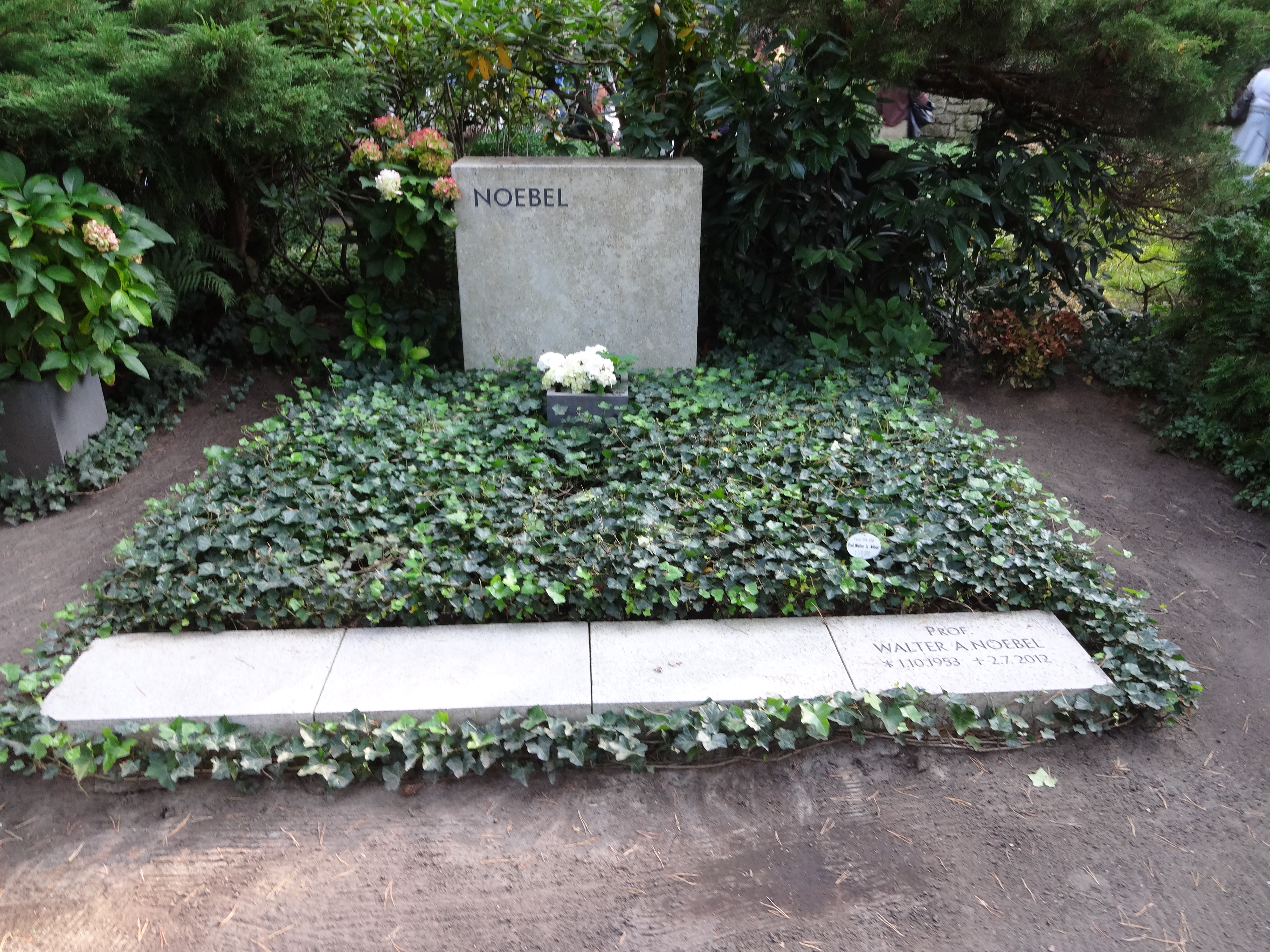 Grab von Prof. Walter A. Noebel auf dem Waldfriedhof Dahlem